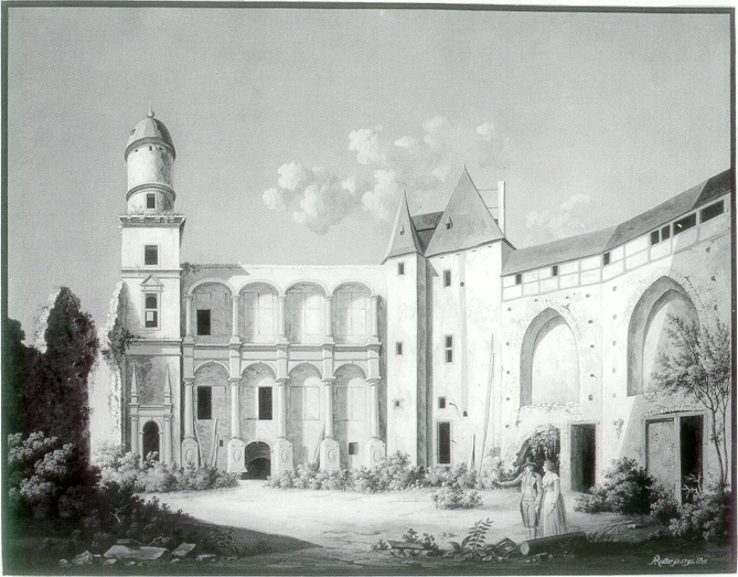 Schloss Hülchrath, Innenhof von Süden, um 1795